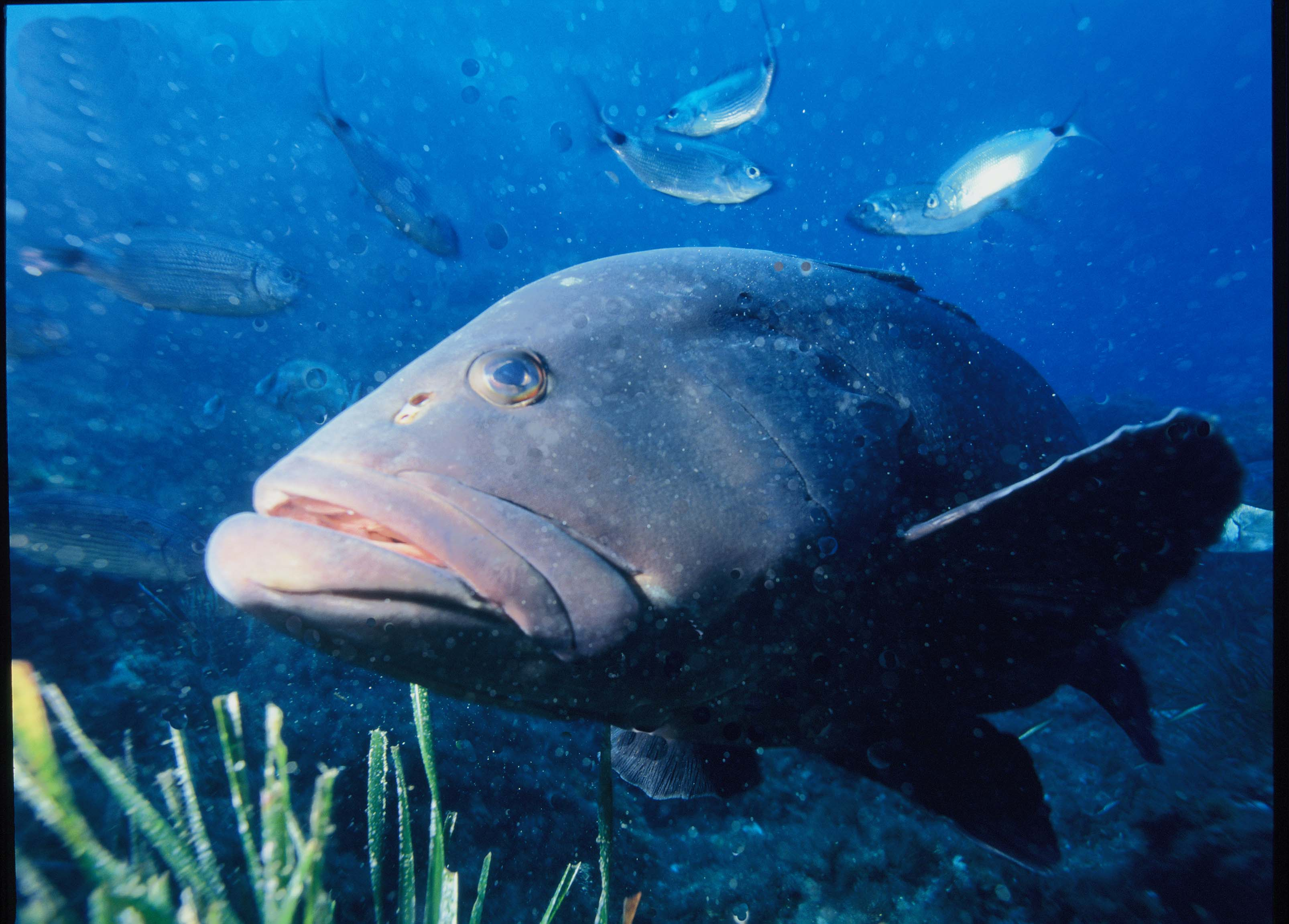 Diné bizaad: Daadílí łibáhígí.